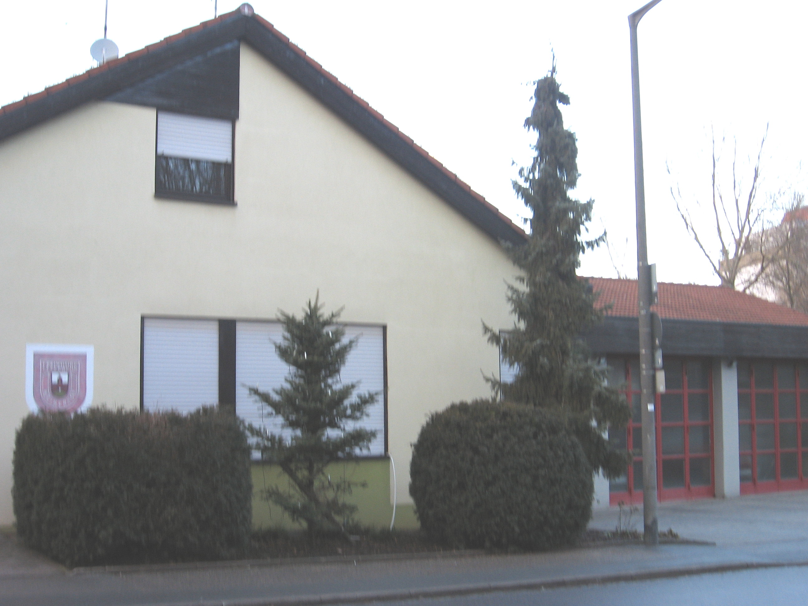 Feuerwehrgerätehaus Weiherhof